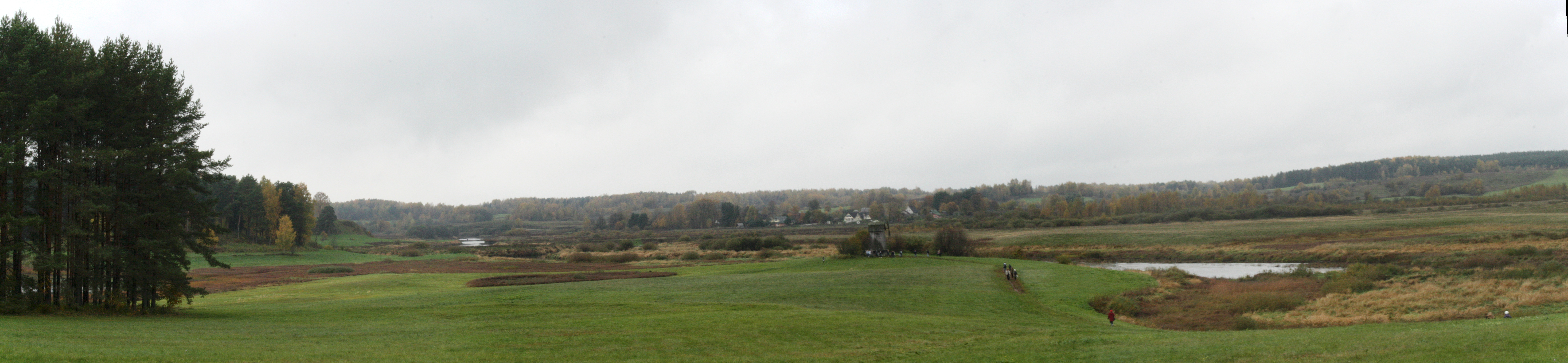 "Унылая пора", дождь